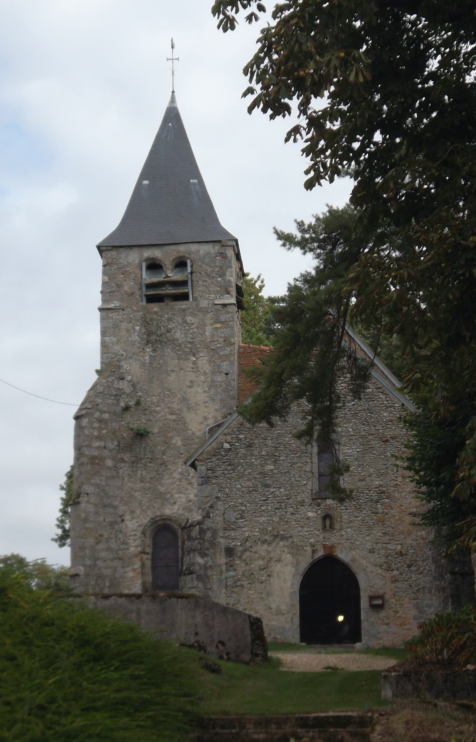 Façade de l'église Saint-Martin de Mœurs (Marne, France).